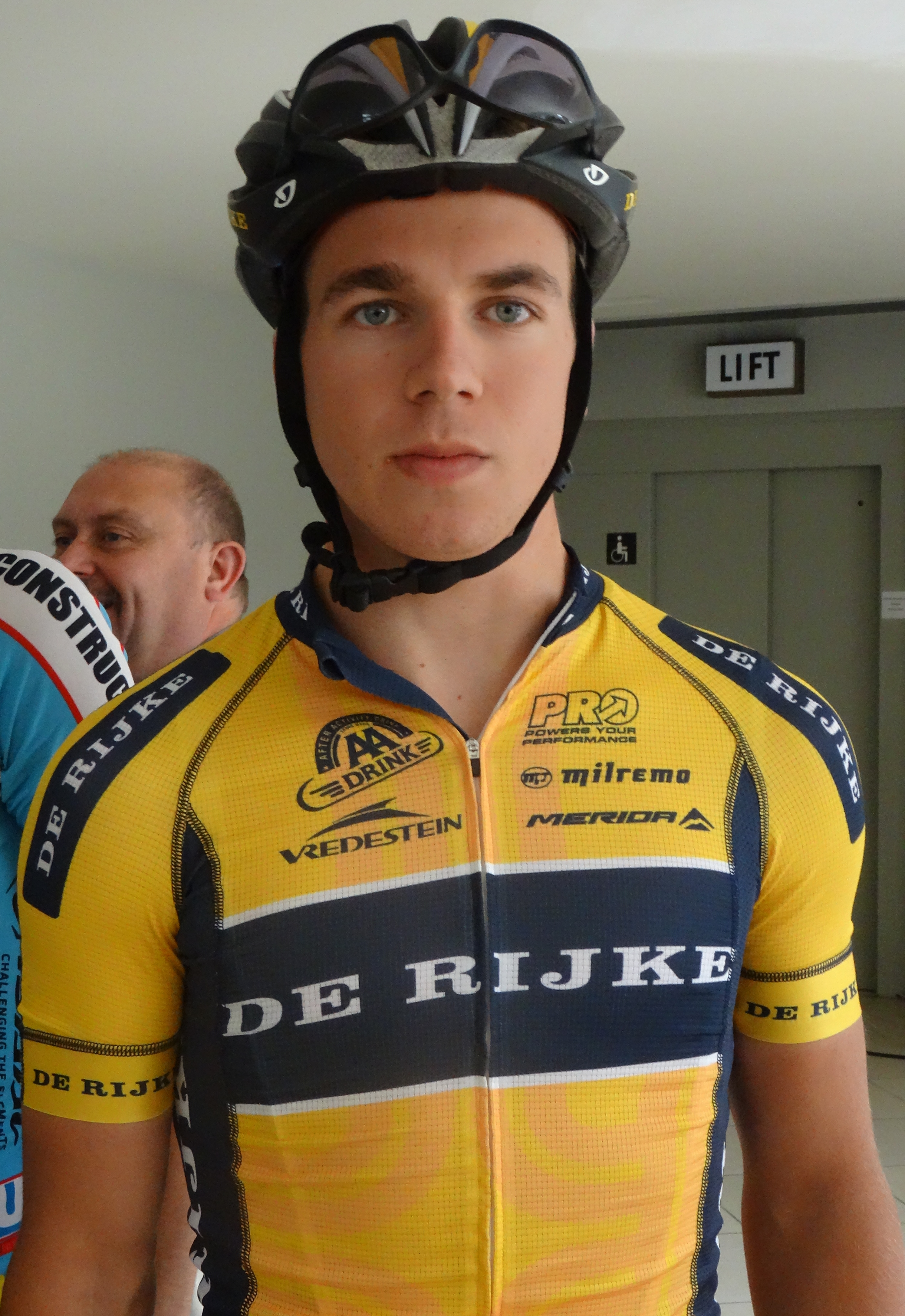 Reportage photographique réalisé le samedi 13 septembre à l'occasion du départ et de l'arrivée de la Flèche côtière 2014 à Heist (Knokke-Heist), Belgique.